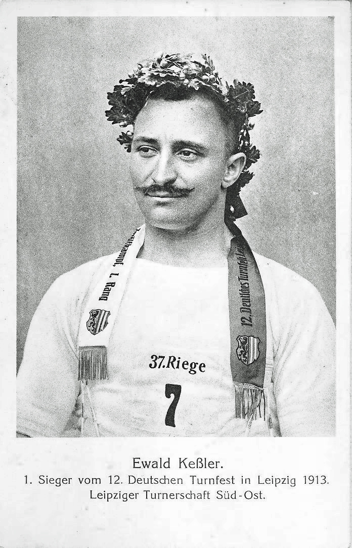 Deutsches Turnfest 1913 in Leipzig, Gewinner des Zwölfkampfes Ewald Keßler